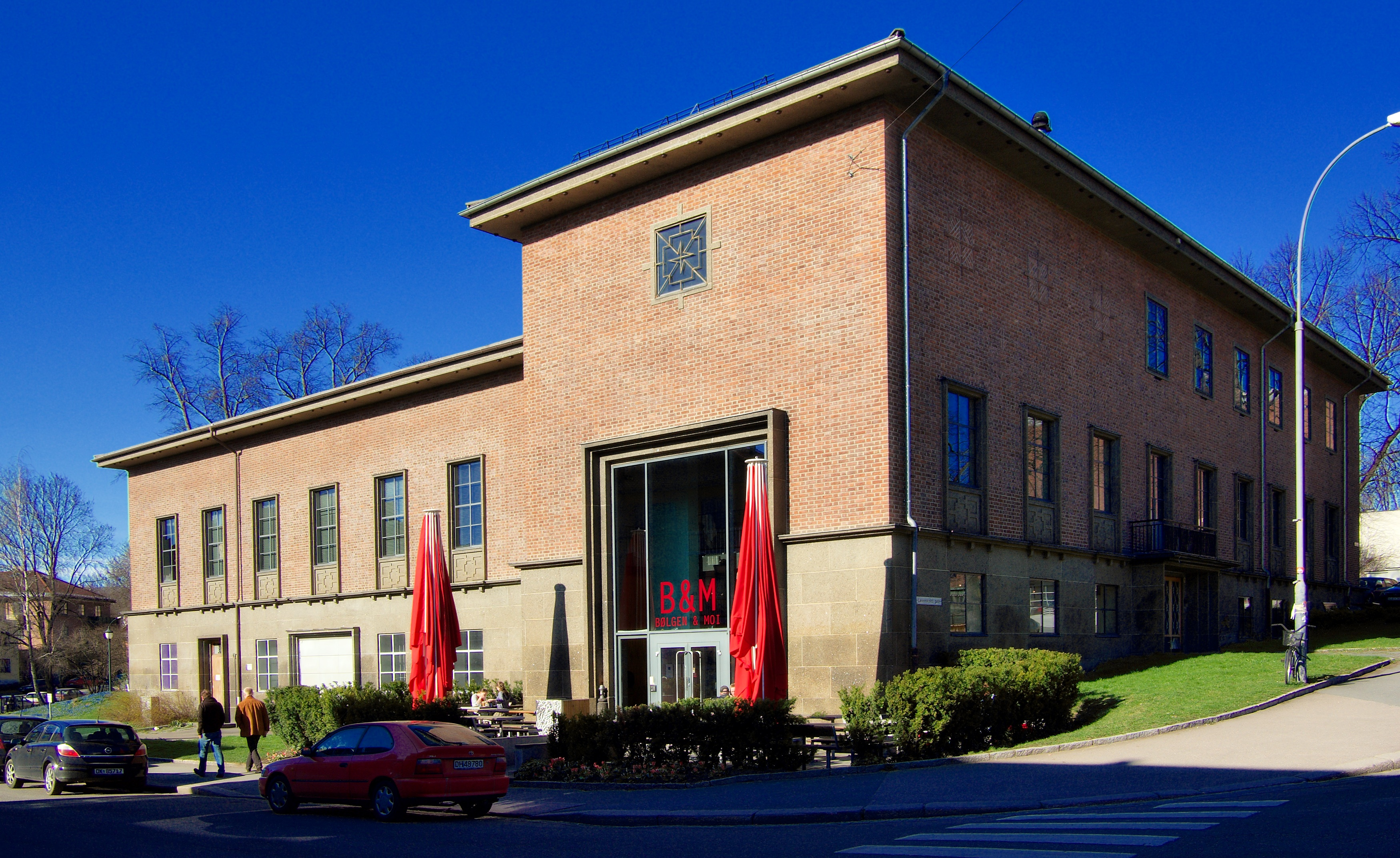 Restaurant Bølgen & Moi på Briskeby i Oslo. See above